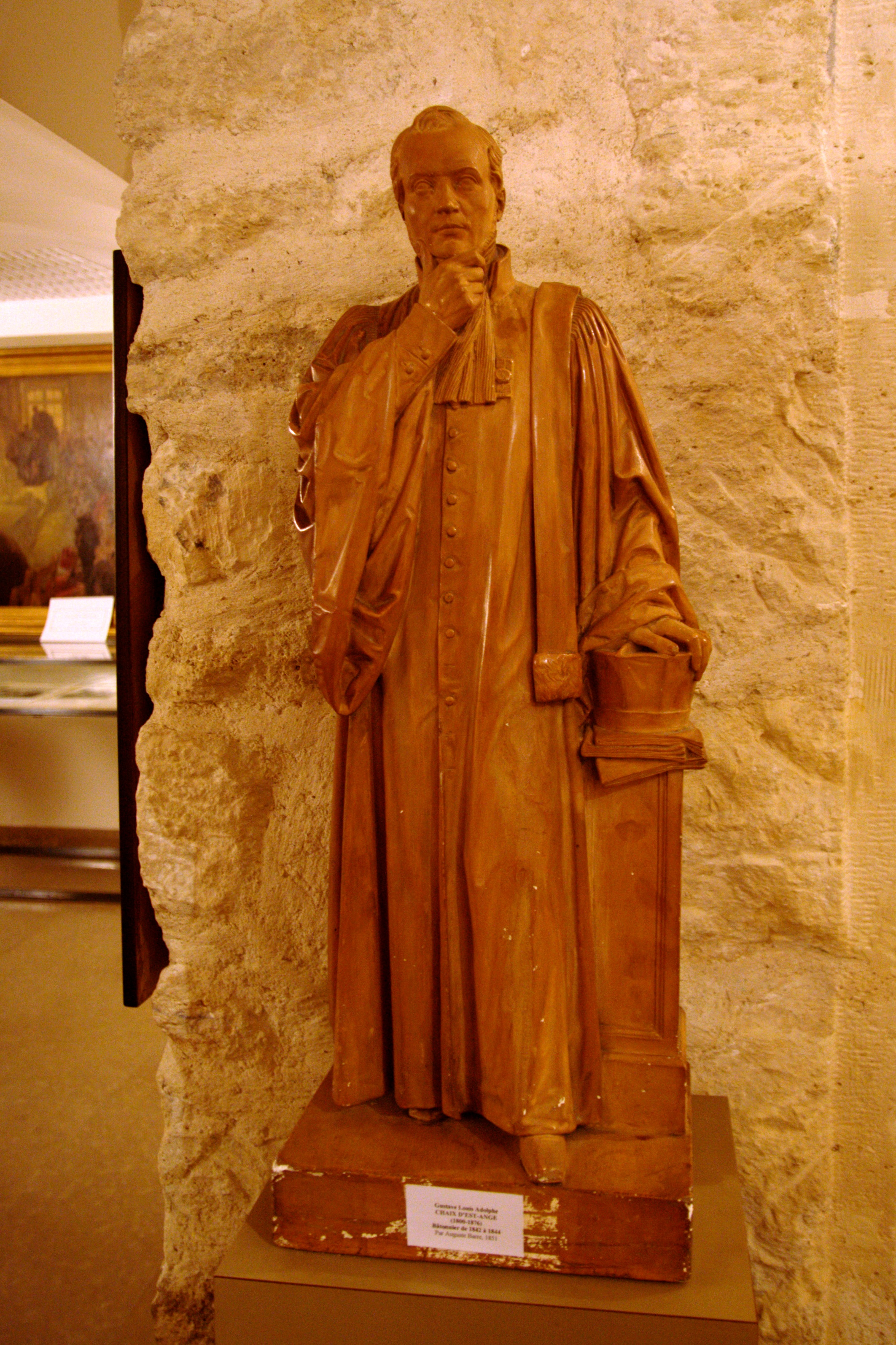 Musée du Barreau de Paris (dans l'hôtel de La Porte) : sculpture de 1851 de Jean-Auguste Barre représentant, en pied, Gustave Louis Chaix d'Est-Ange, bâtonnier de 1842 à 1844